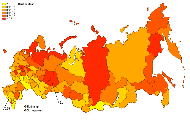 Результаты партии "Правое дело" на парламентских выборах 2011 года